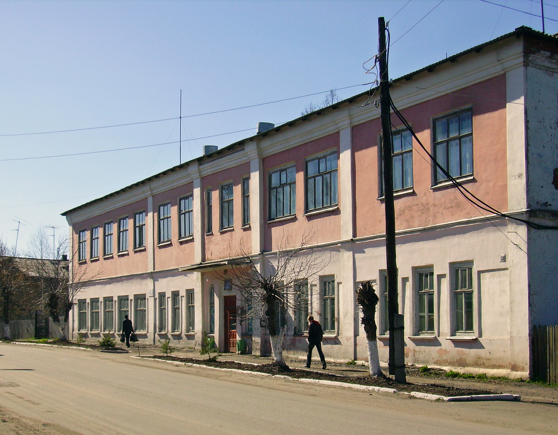 Котельнич. Средняя школа №2